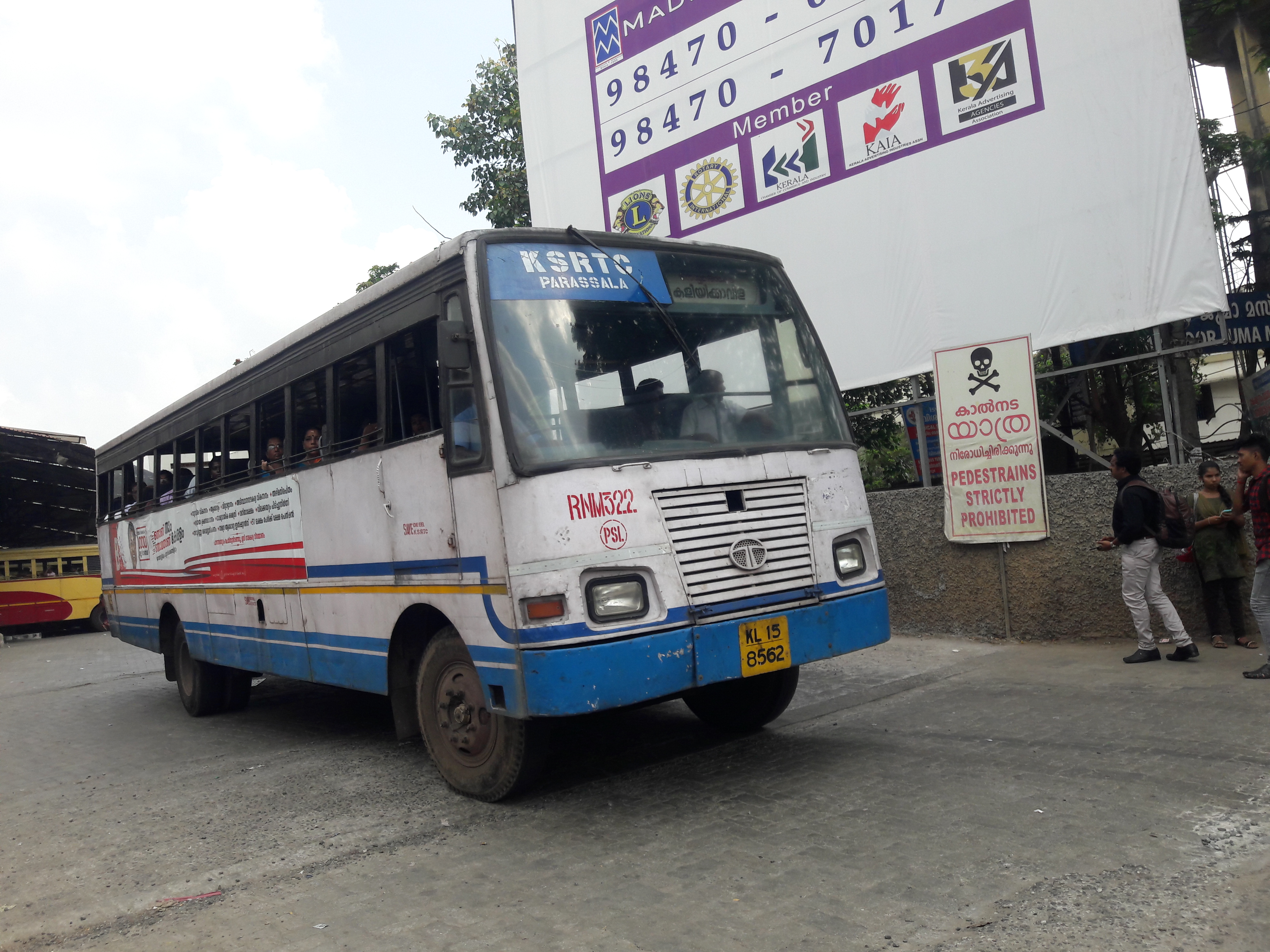 കേരള സ്റ്റേറ്റ് റോഡ് ട്രാൻസ്പോർട്ട് കോർപ്പറേഷൻ തിരുവനന്തപുരം.